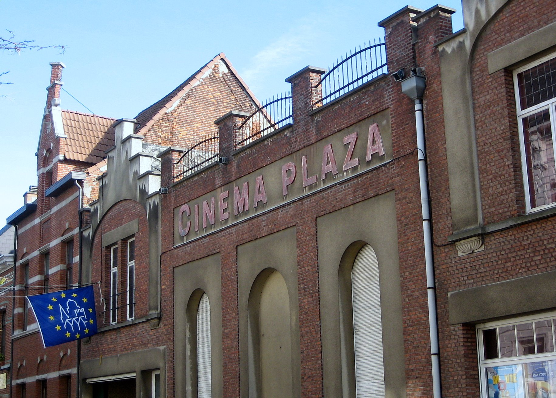 Voorgevel van Cinema Plaza te Duffel